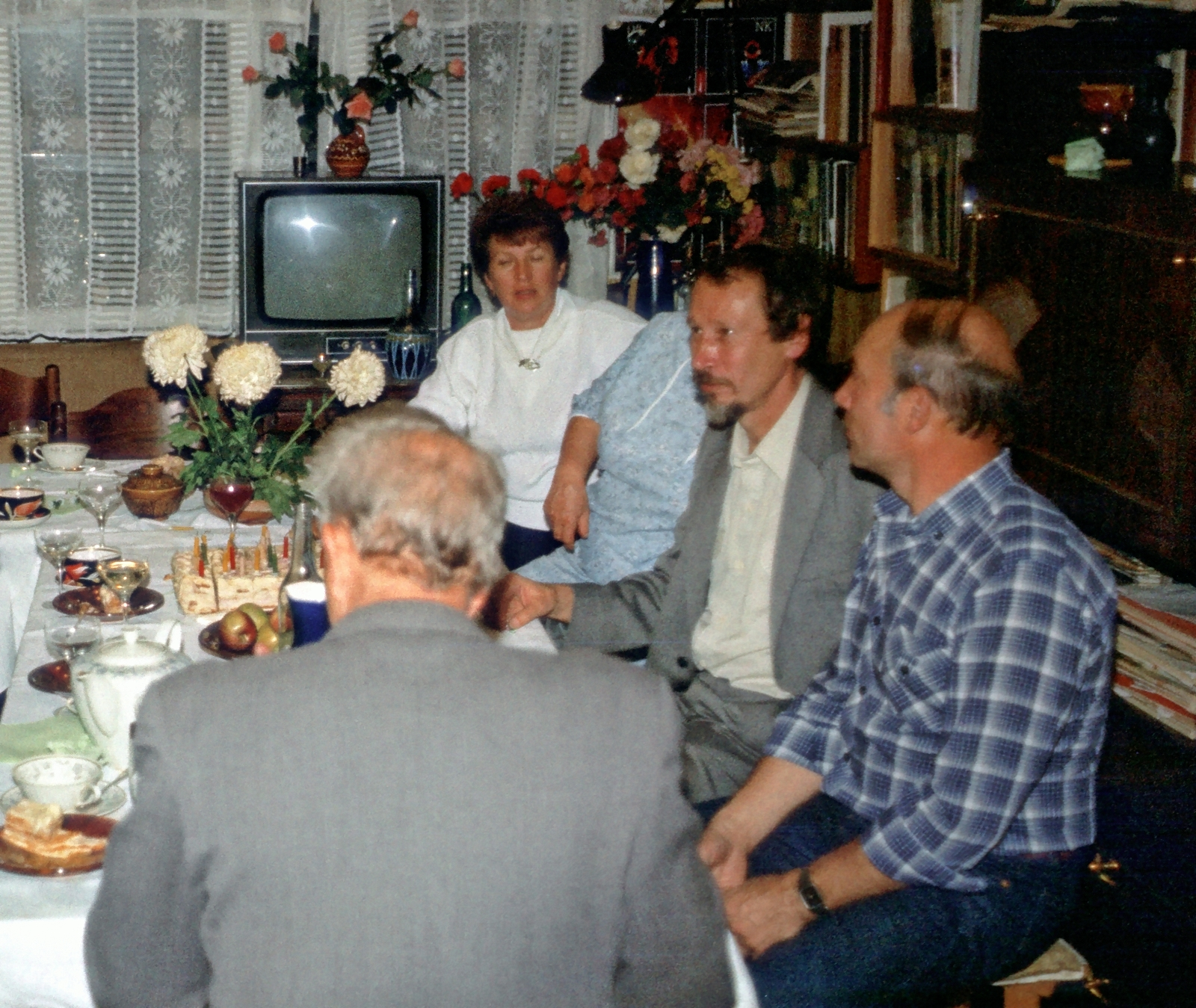 Л. Г. Бондарев, Р. И. Злотин, Н. Н. Богданов.